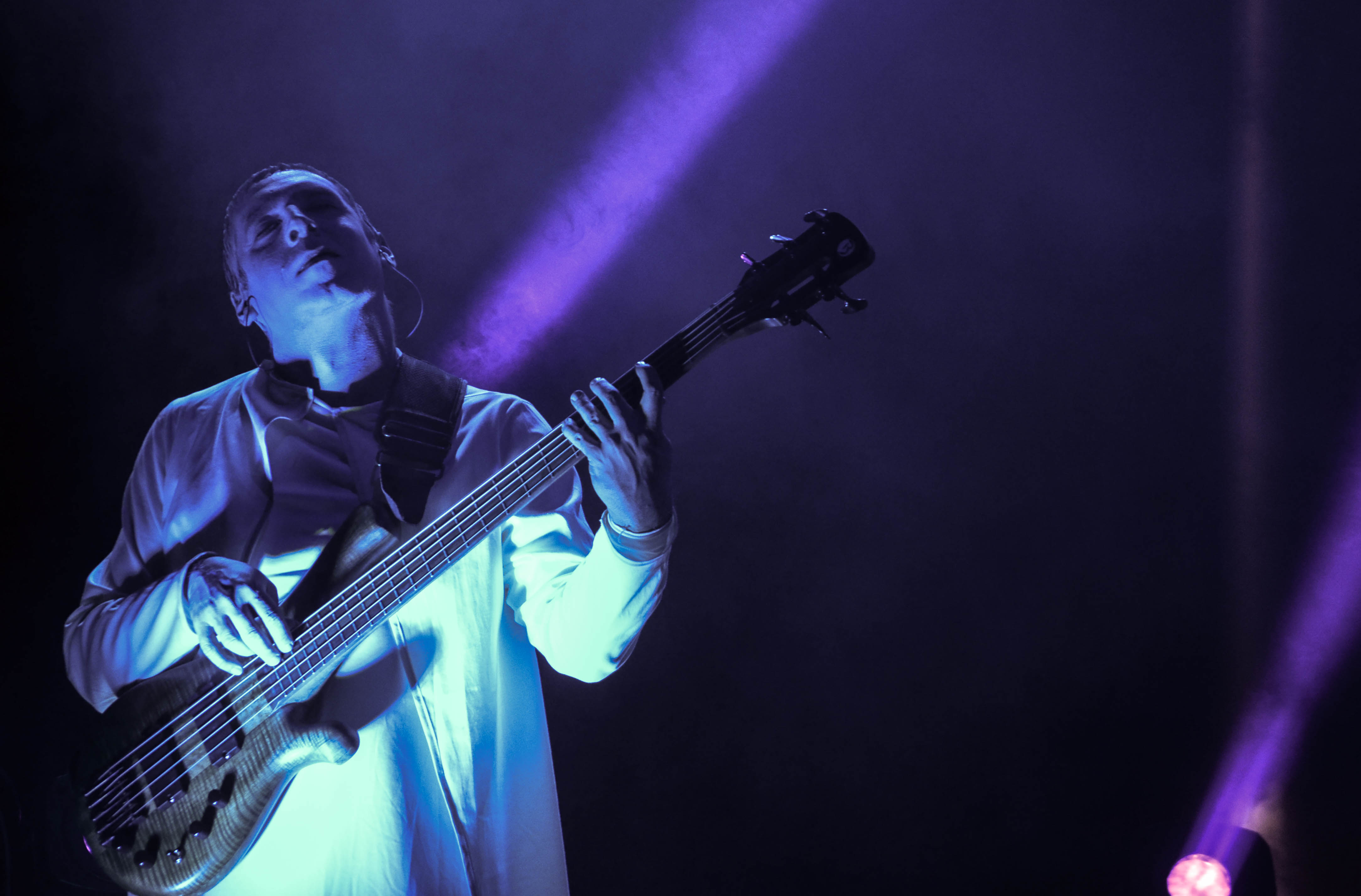 Juan José "Juanjo" Casals: bajista de Sig Ragga, banda argentina de reggae fusión formada en la ciudad de Santa Fe